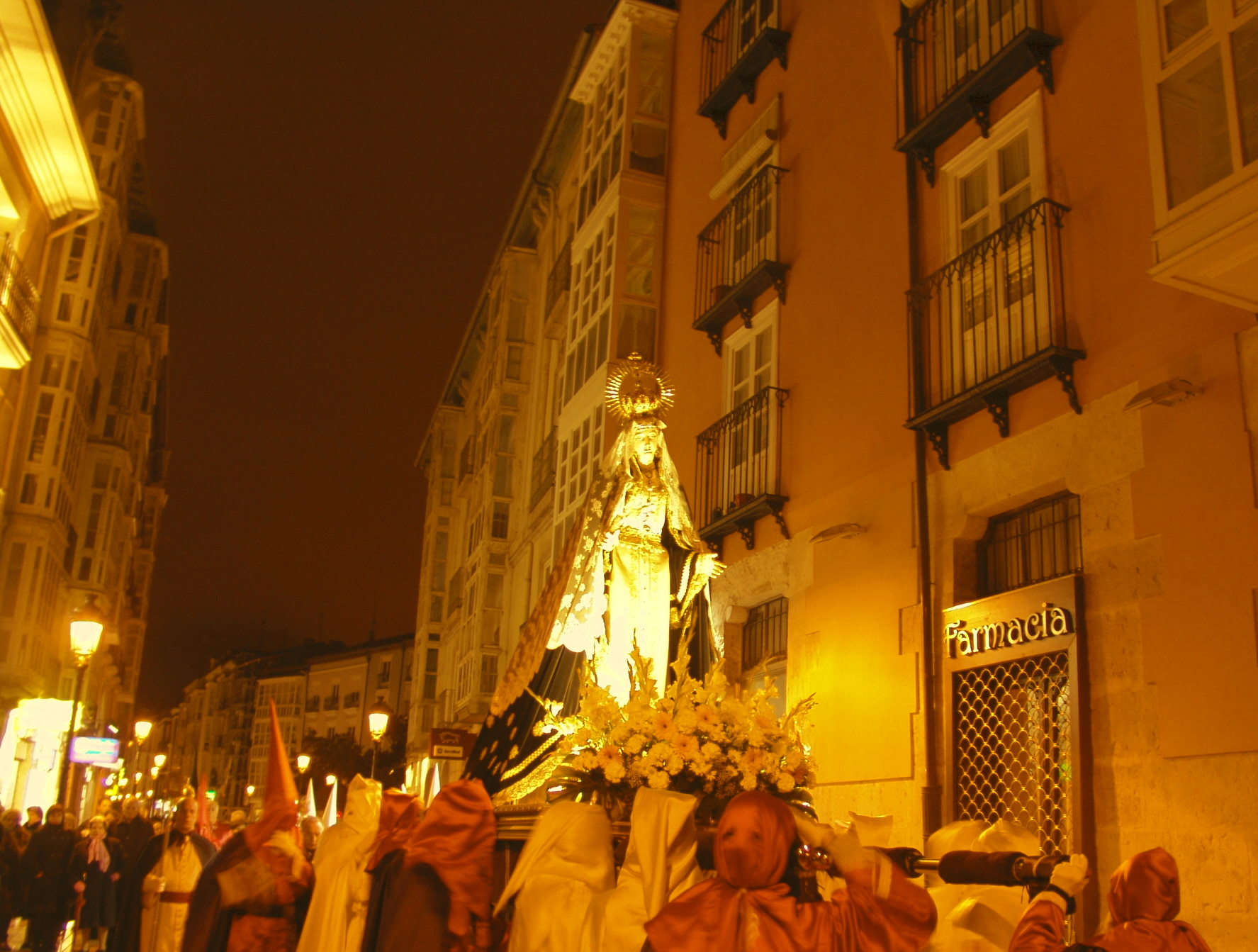 Procesión Miércoles Santo, “calle Laín Calvo” , paso de “Nuestra Señora del Amor hermoso” , parroquia de “San Lorenzo”, Burgos, España